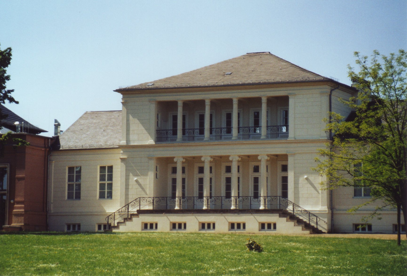 Gesellschaftshaus in Magdeburg (Buckau), ursprünglicher Teil von 1829 mit Schinkelsaal, Ansicht von Nord-Ost